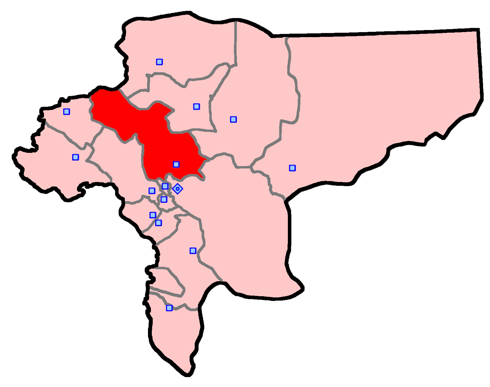 حوزهٔ انتخاباتی شاهین‌شهر و میمه و برخوار برای انتخابات مجلس شورای اسلامی